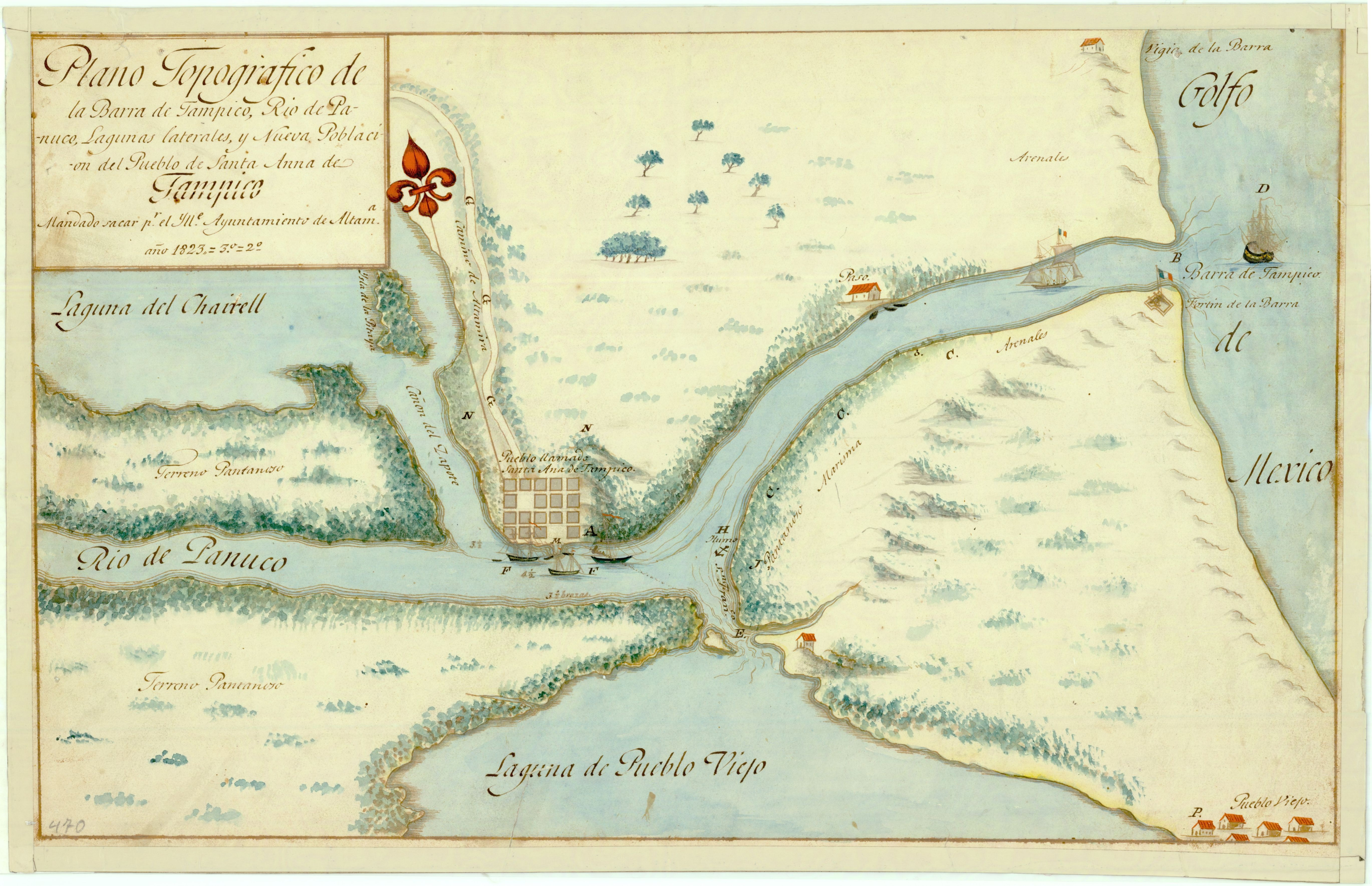 Plano topográfico de la Barra de Tampico y Río Pánuco. Tinta y acuarela sobre papel.